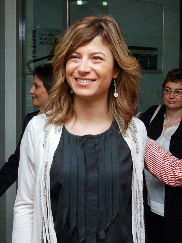 La Ministra de Igualdad, Bibiana Aído, visita la UNED para revisar las actividades del Instituto de Estudios de Género.